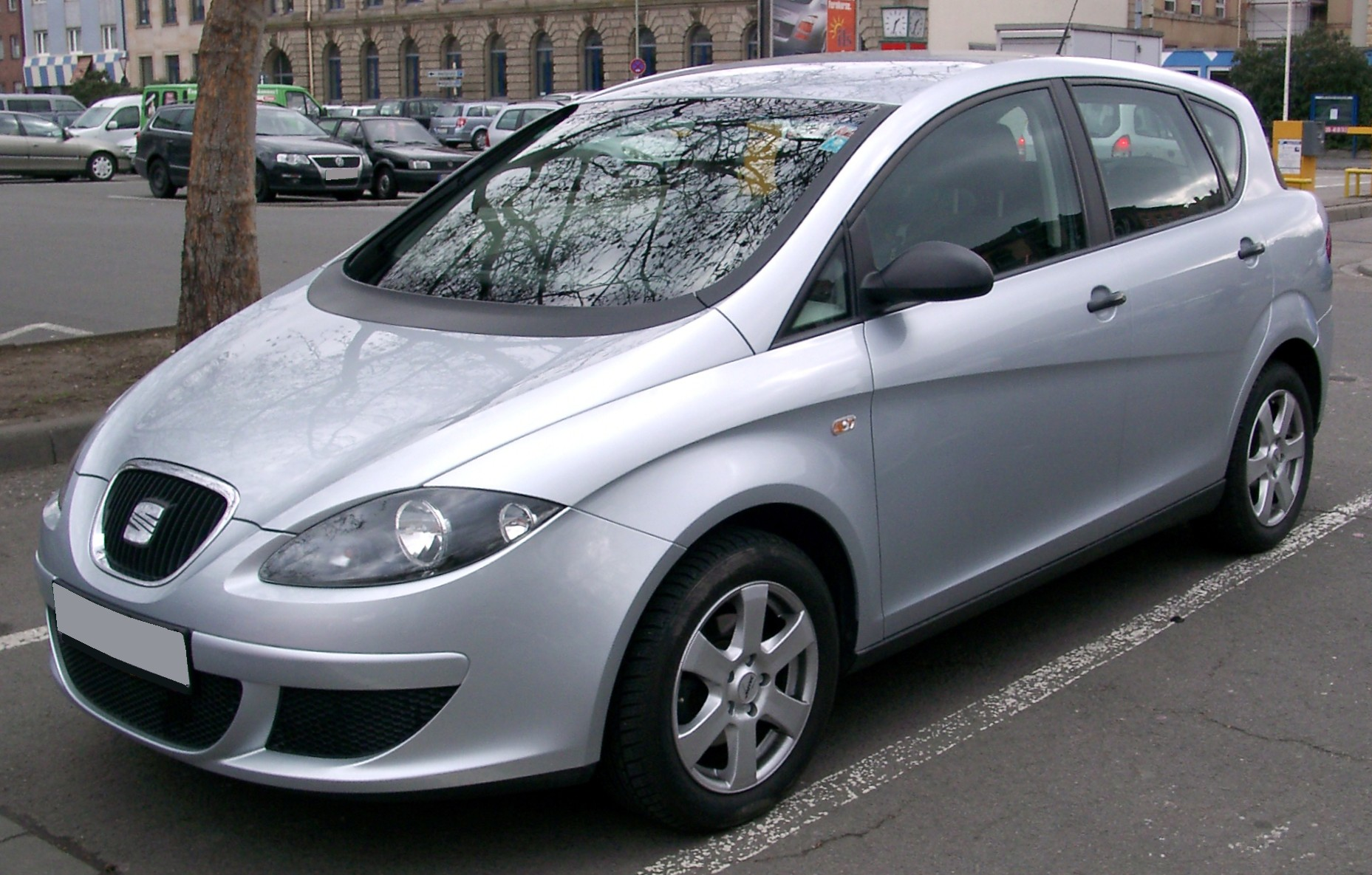 Seat Toledo, 3. Generation